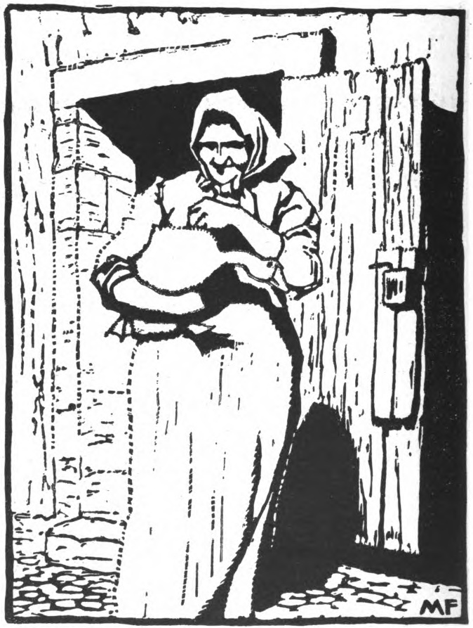 Max Frey. Bild aus der Publikation „Licht und Schatten“. Betitelt mit „Gänsefrau“. Ca. 1911